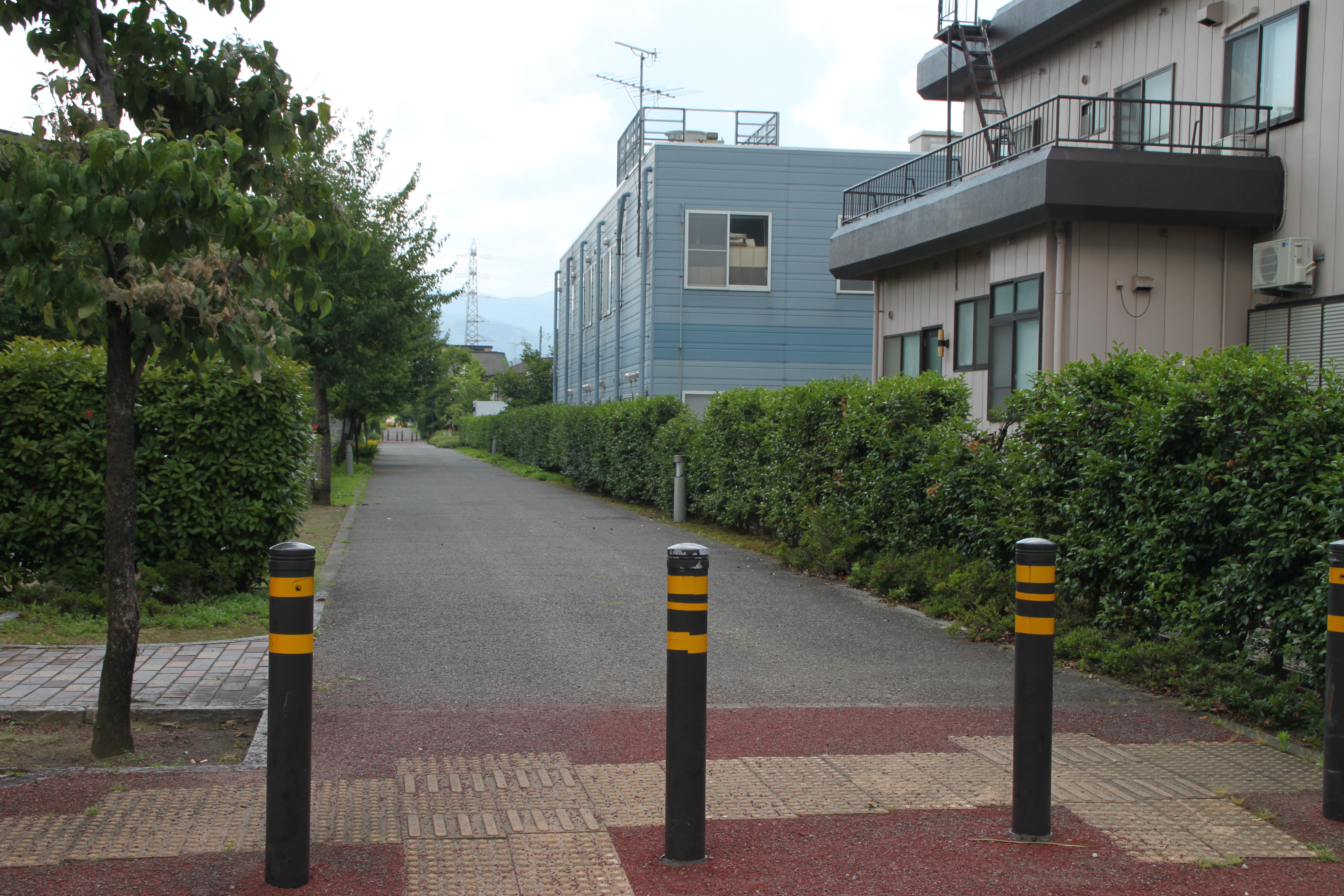 栃尾鉄道土合口駅跡。廃線跡は遊歩道となる。遊歩道の右端にホームがあり、上屋の待合室があった。